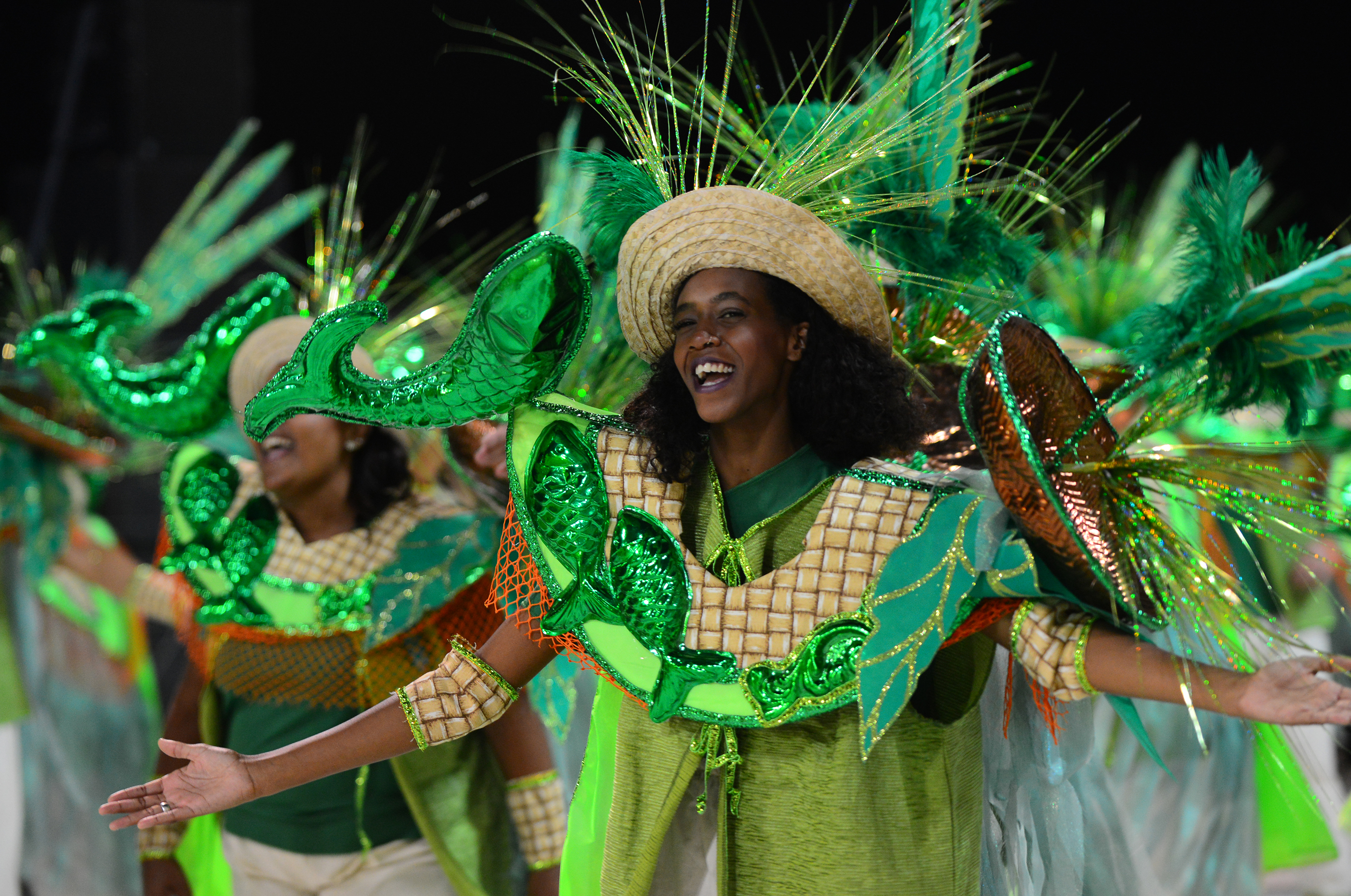 Desfile da G.C.E.R.E.S. Os Protegidos da Princesa em 2014. A escola foi a campeã.